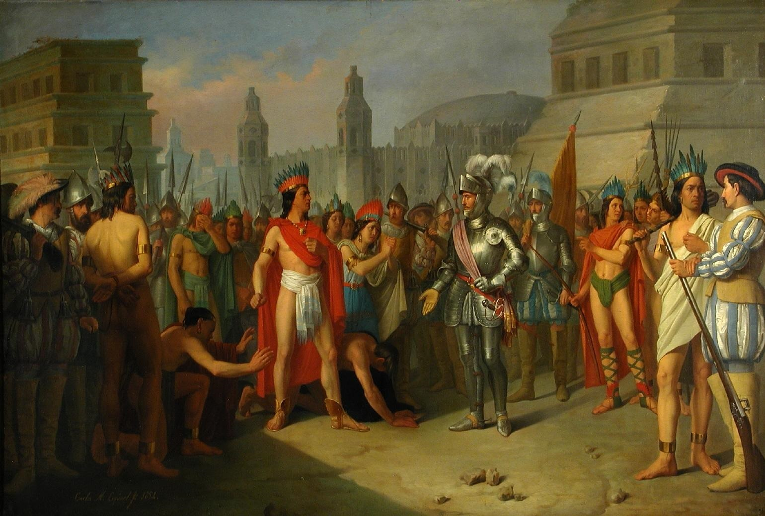 La obra representa el momento en que Cuauhtémoc († 1525), último emperador de los aztecas y conocido como Guatimocín por los conquistadores españoles, fue apresado por estos y por Hernán Cortés, lo que tuvo lugar el día 13 de agosto de 1521.